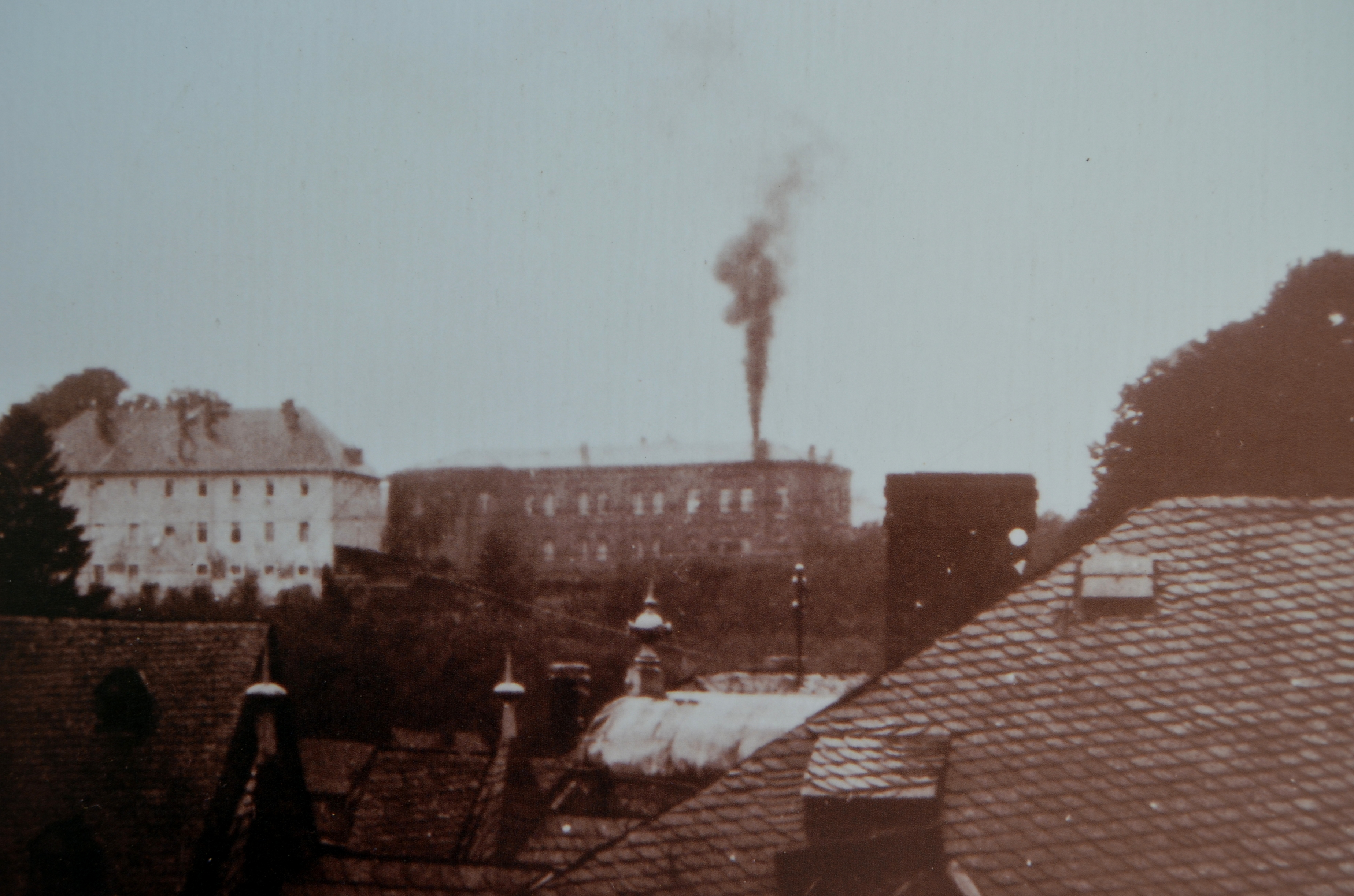 De rook van het crematorium (foto publicatiebord)